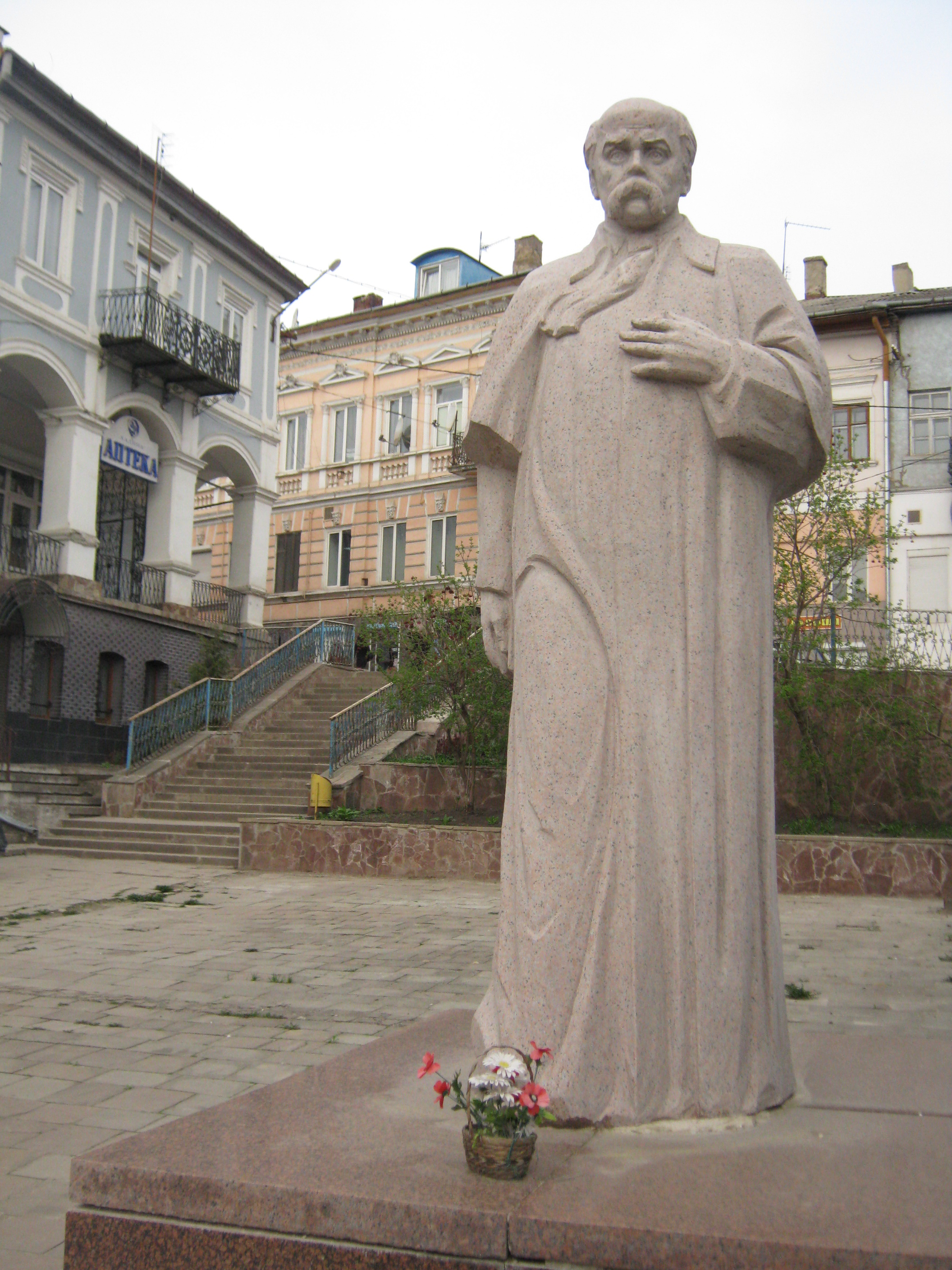 Пам'ятник Тарасові Шевченку, Бучач, після реконструкції Романом Вільгушинським 2015 року